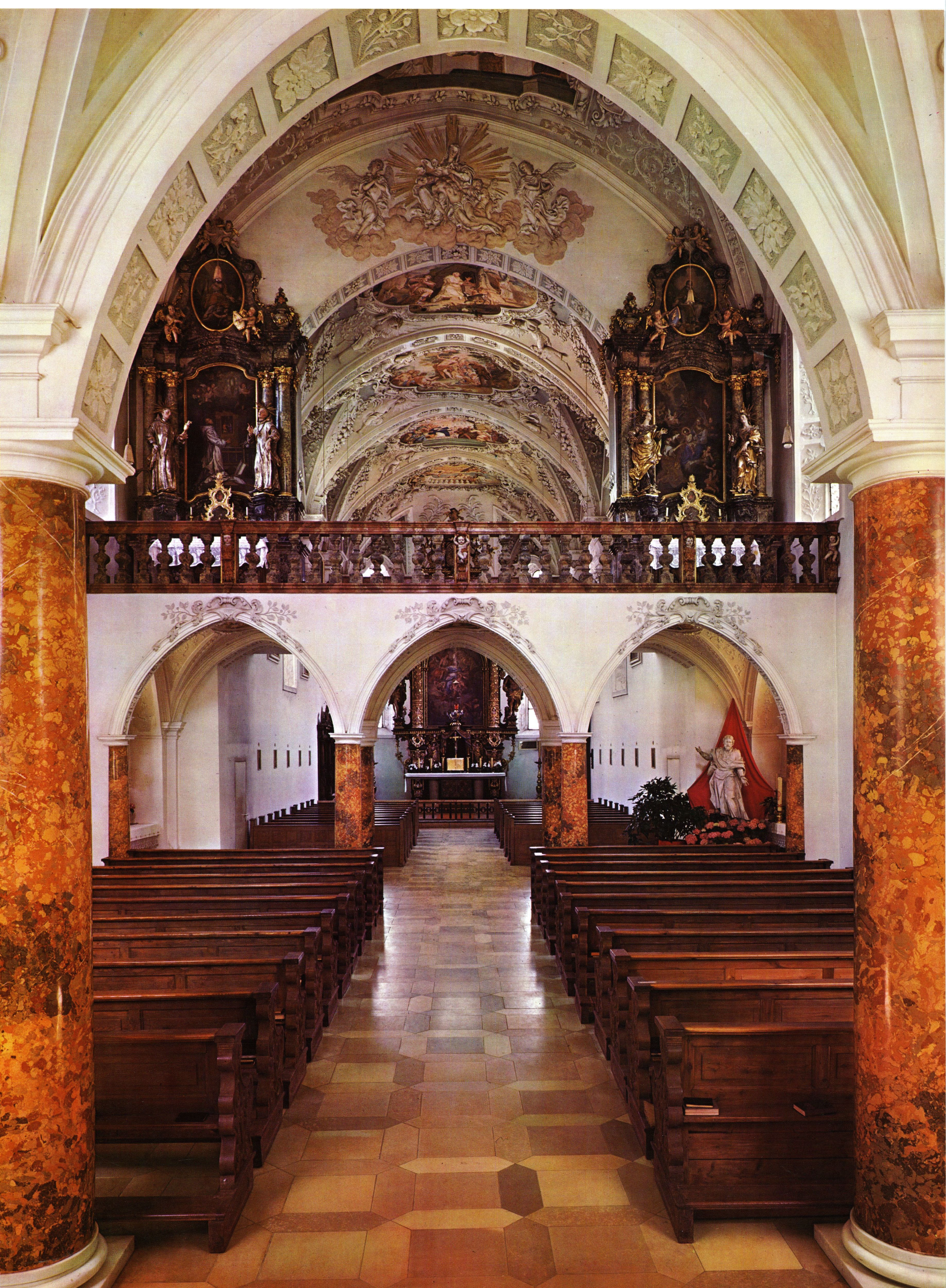 St. Maria im oberschwäbischen Buxheim bei Memmingen vor der Instandsetzung der Kirche im Jahre 1994